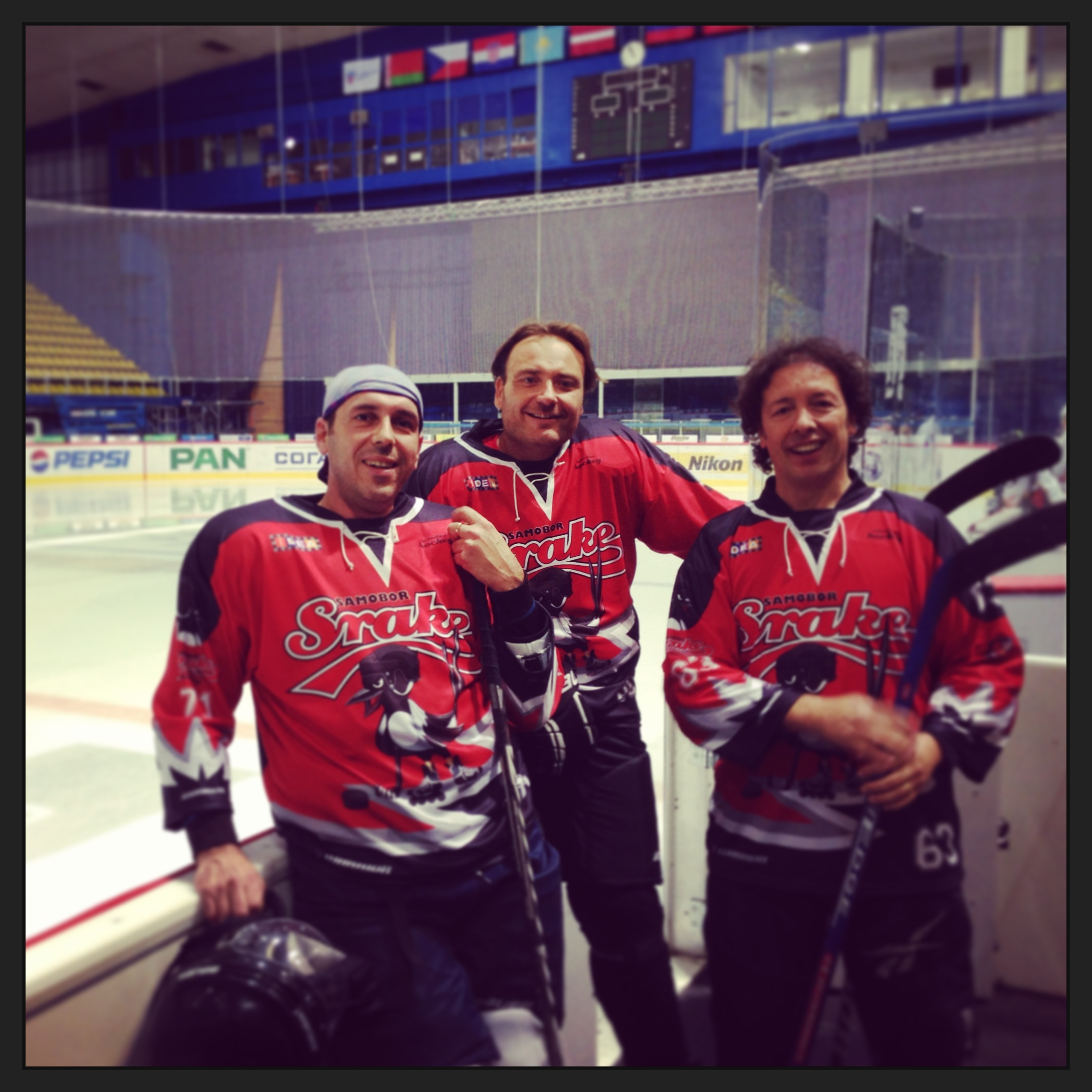 Igrači Sraka na pripremnoj utakmici u Domu sportova u Zagrebu u novim dresovima za sezonu 2013/2014